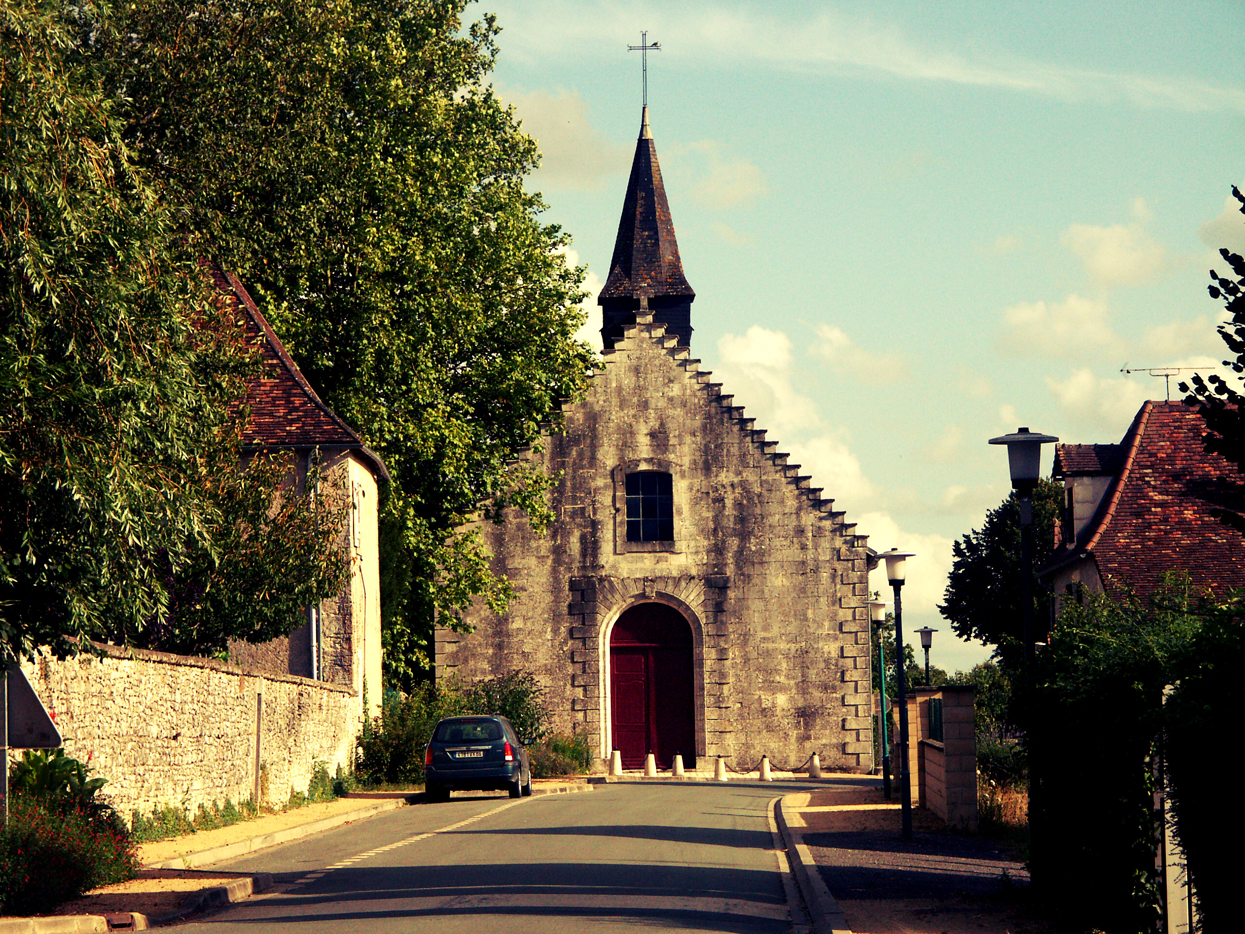 L’Eglise Saint-Maixent de Villemort, Vienne